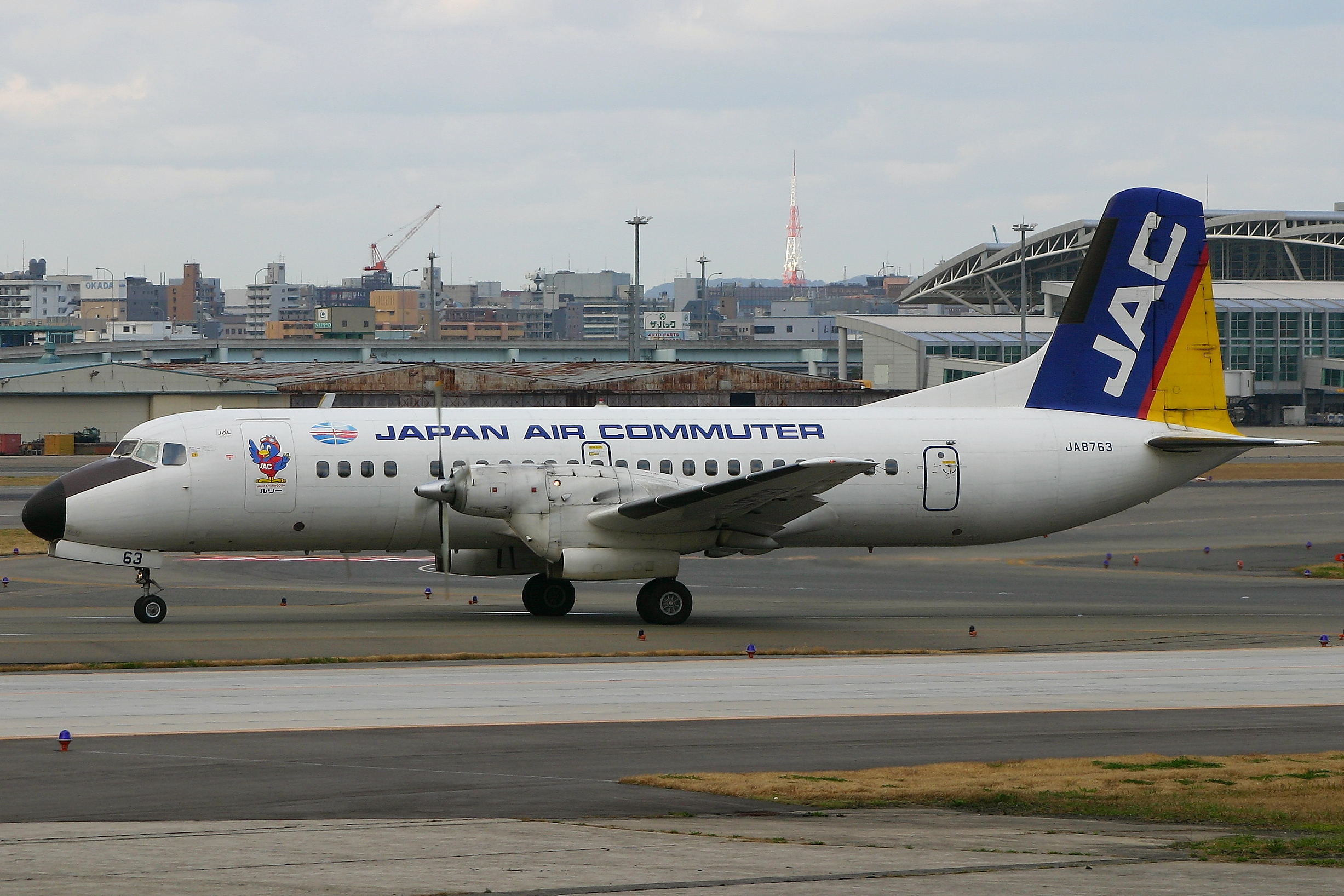 日本エアコミューター 日本航空機製造 YS-11 福岡空港